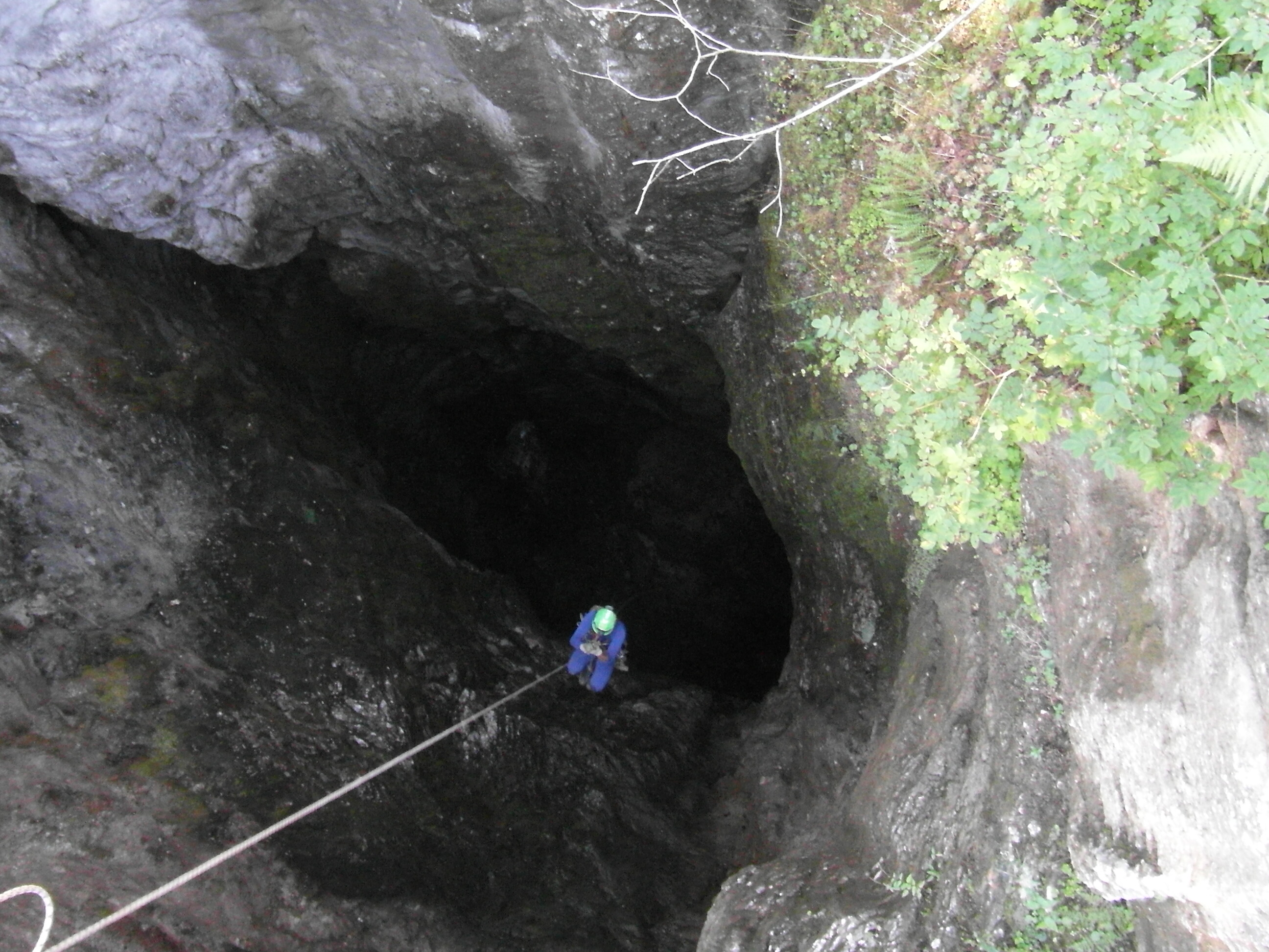 Spéléologue sortant du scialet de Malaterre